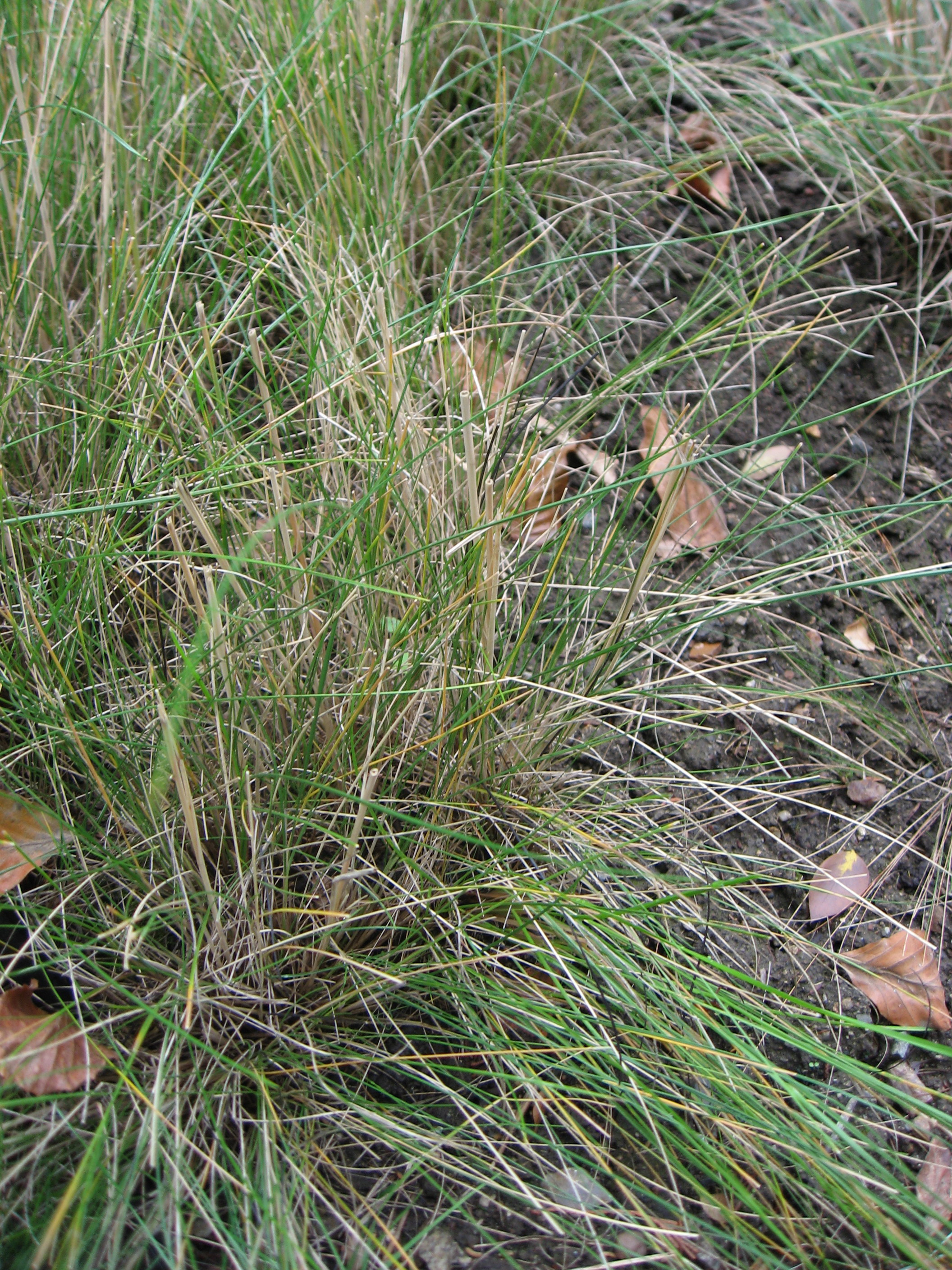 Kavyl vláskovitý